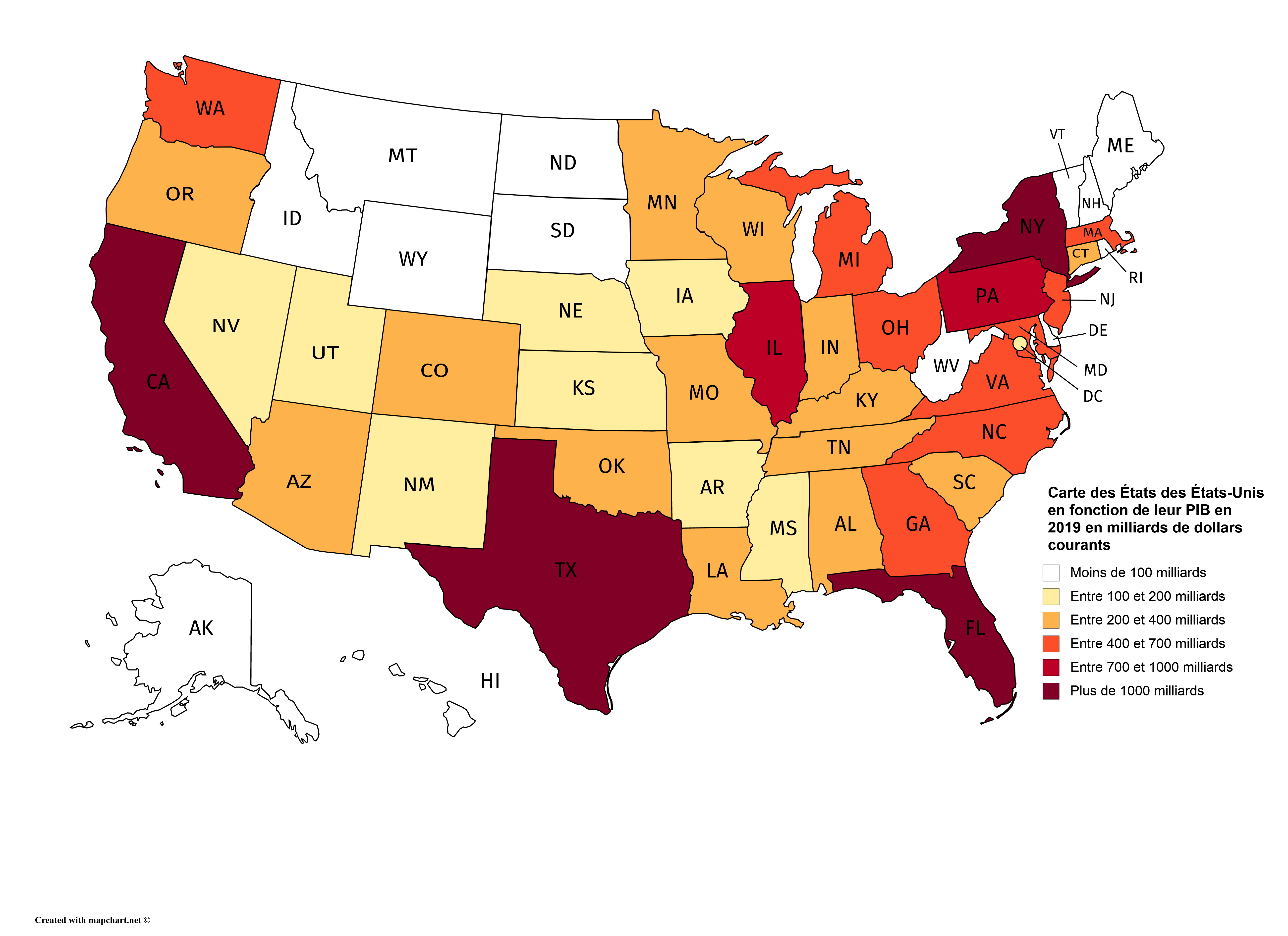 Carte des États des États-Unis en fonction de leur PIB en 2019 en milliards de dollars courants. Carte faite à partir du site